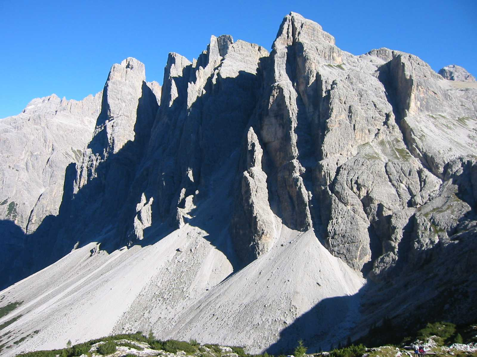 Einser bei Sexten